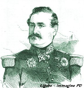 Ritratto del generale francese Élie Frédéric Forey, comandante della 1ª divisione del I corpo d'armata, durante la seconda guerra d'indipendenza del 1859.